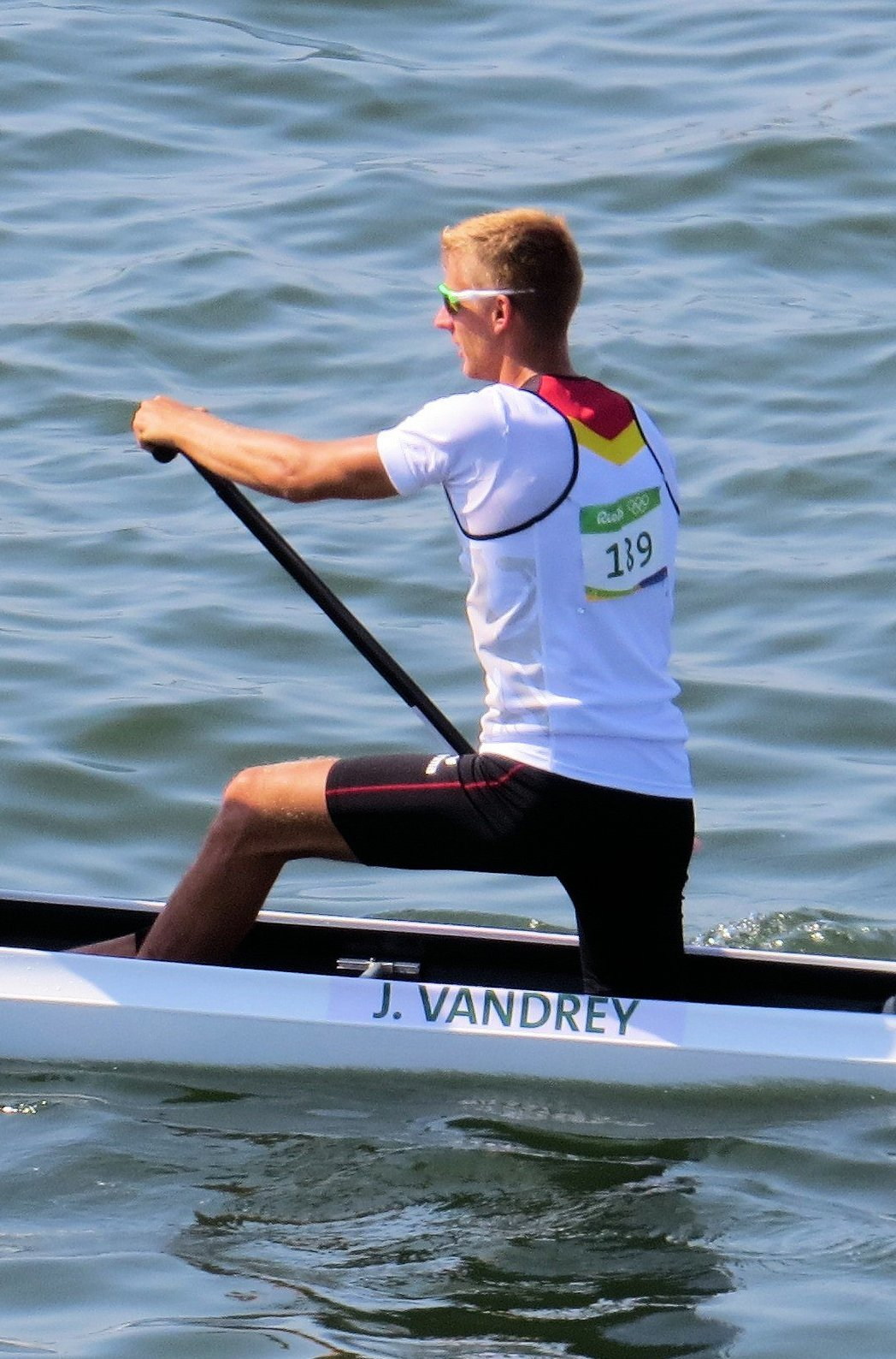 Sx50